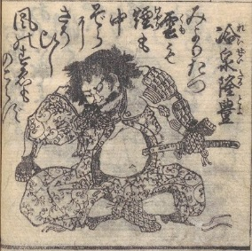 冷泉隆豊